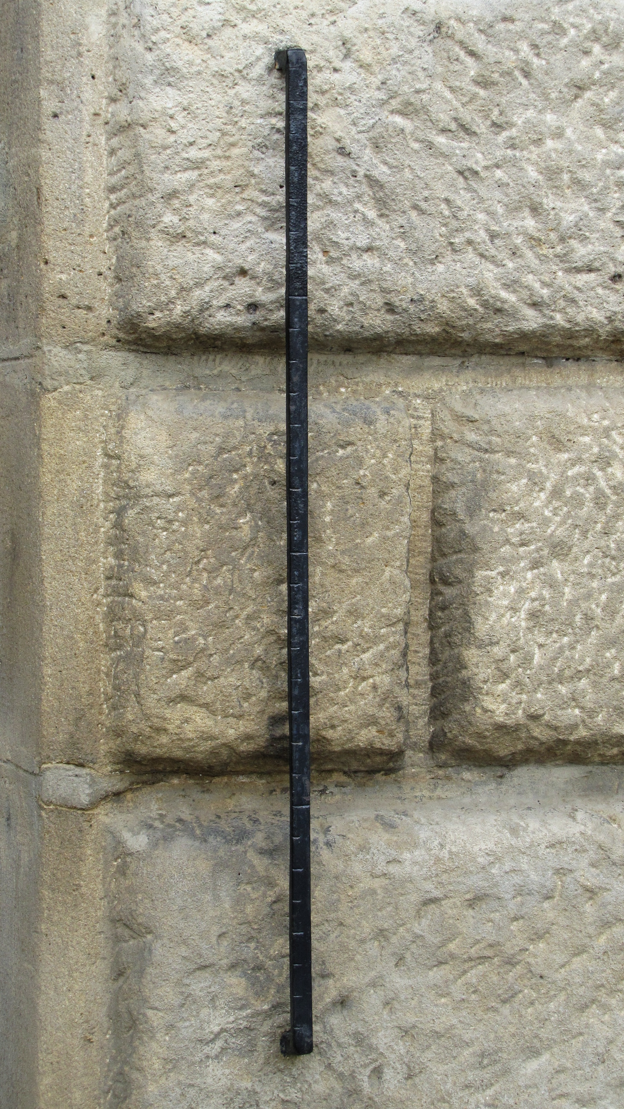 Loket - míra u vchodu do kyjovské radnice k přeměřování zboží zakoupeného na trhu. Celková délka je 75 cm a je rozdělen na 30 dílků po 2,5 cm. Podobný železný loket je na Moravě dochován patrně už jen na radnici v Moravské Třebové.